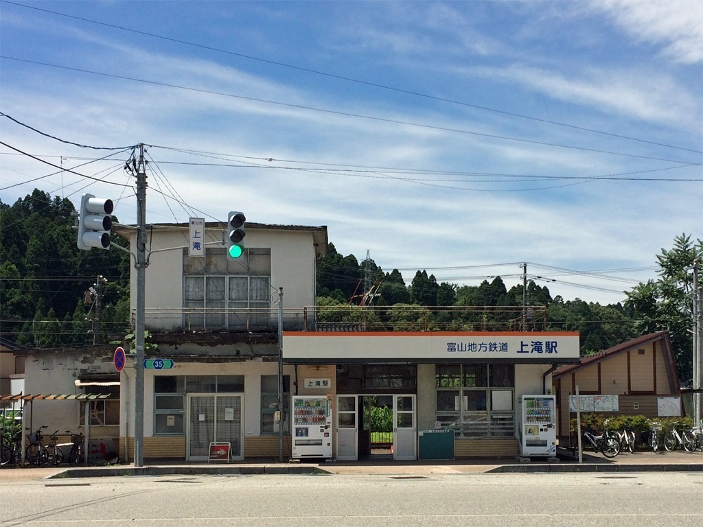 富山地方鉄道上滝線 上滝駅